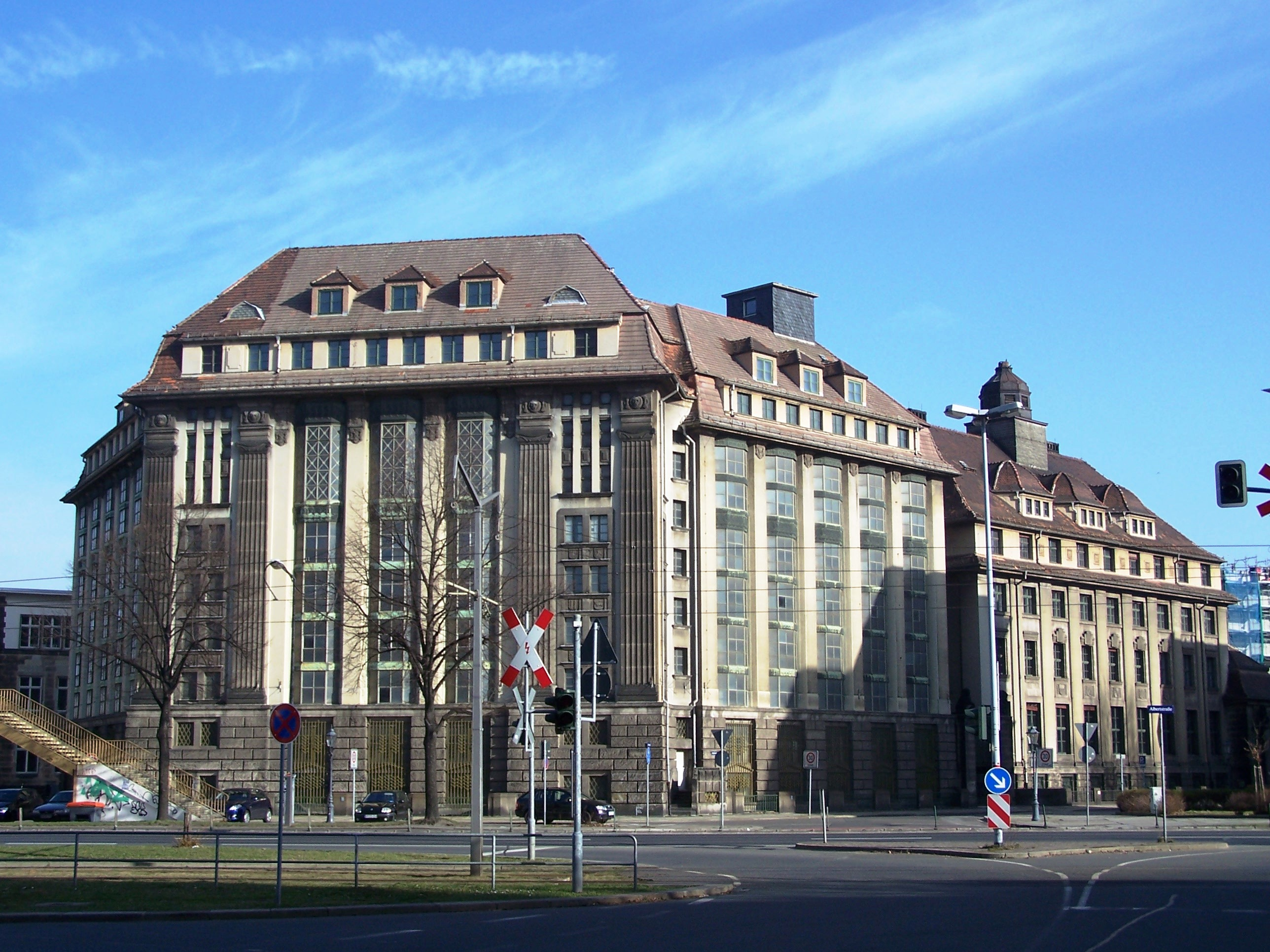 Hauptstaatsarchiv Dresden, Archivstr. 14, erbaut 1912–1915 von Karl Ottomar Reichelt und Heinrich Koch